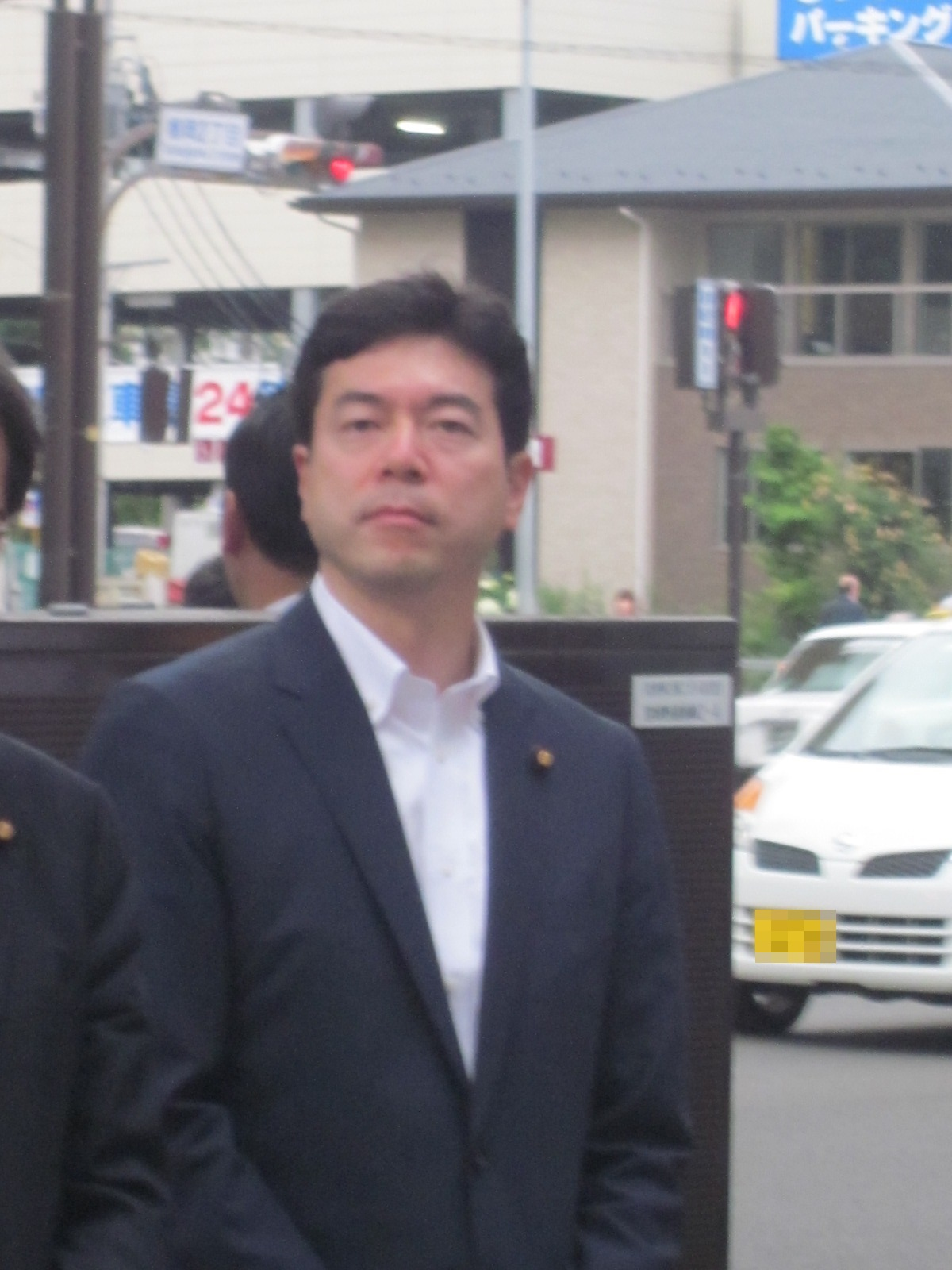 参議院議員・愛知治郎。2016年6月22日、第24回参議院議員選挙宮城選挙区応援演説にて。